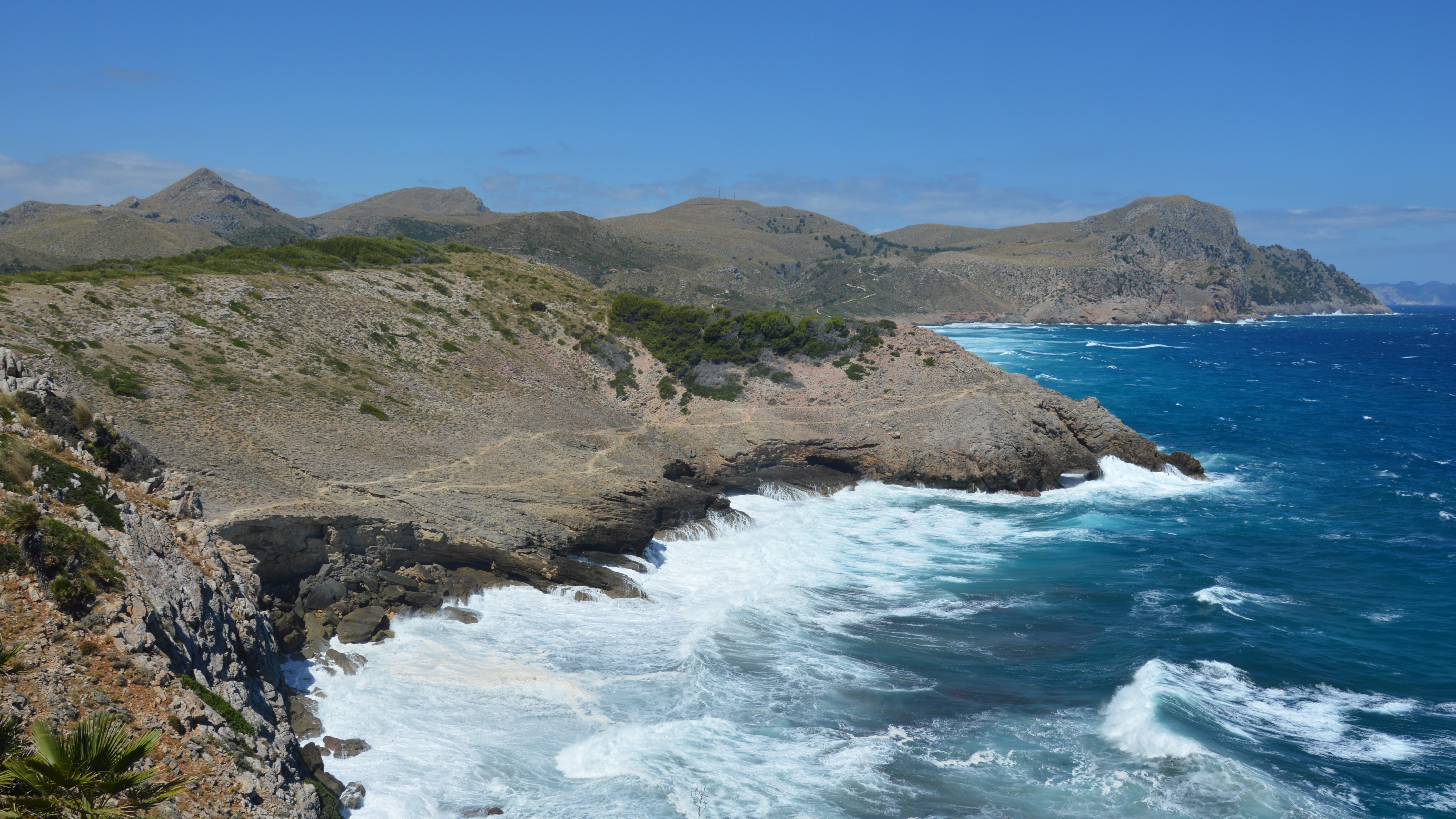 Kap Farrutx